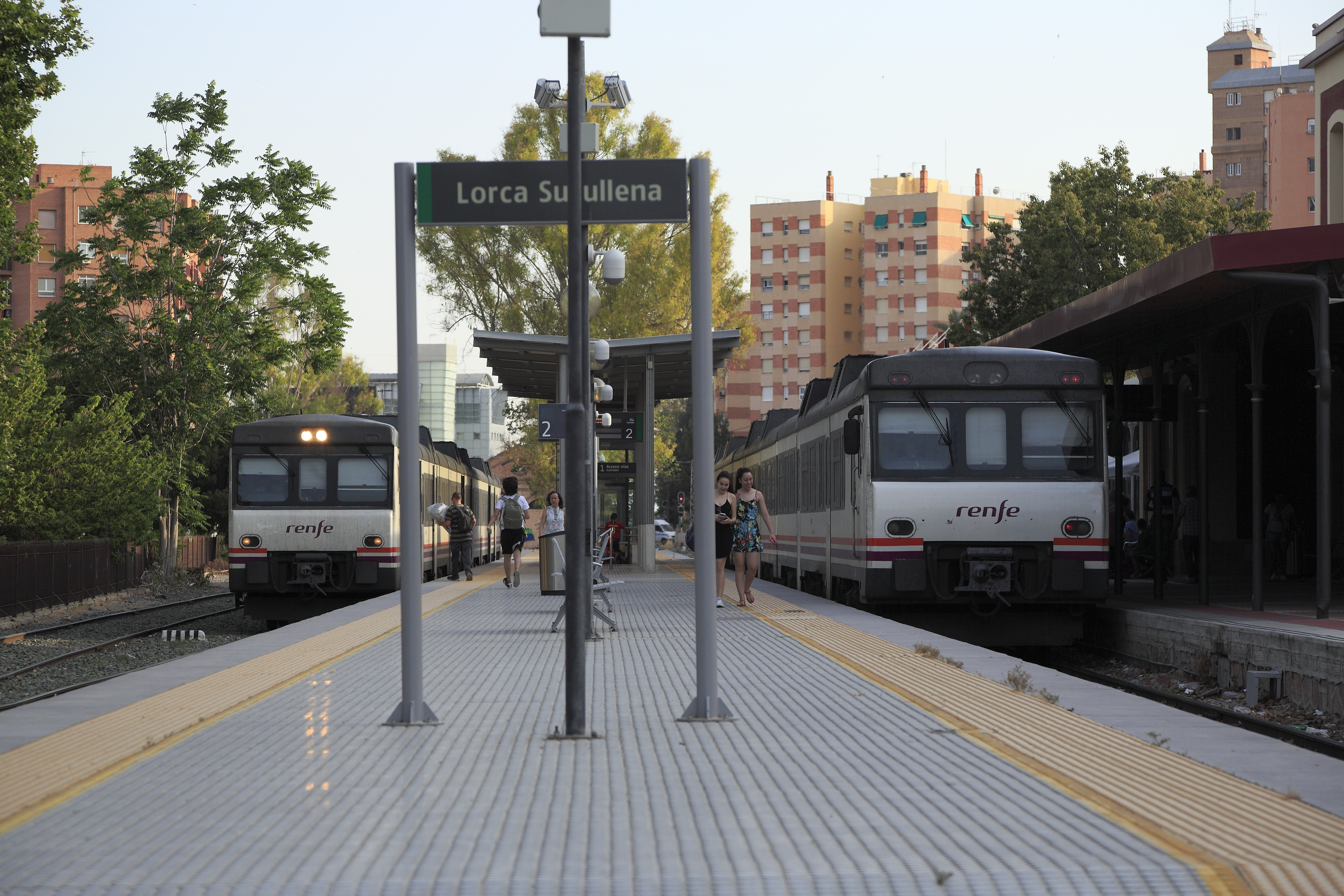 Inselbahnsteig, der linke Zug ist einer der wenigen, die von Aguilas kommen. Er fährt weiter nach Murcia, der rechte endet hier. Zwischen Lorca-Sutullena und Murcia besteht als S-Bahn-Linie C2 ein Stundentakt, bis und ab Aguilas verkehren nur drei, während der Sommerferien sechs Zugpaare.